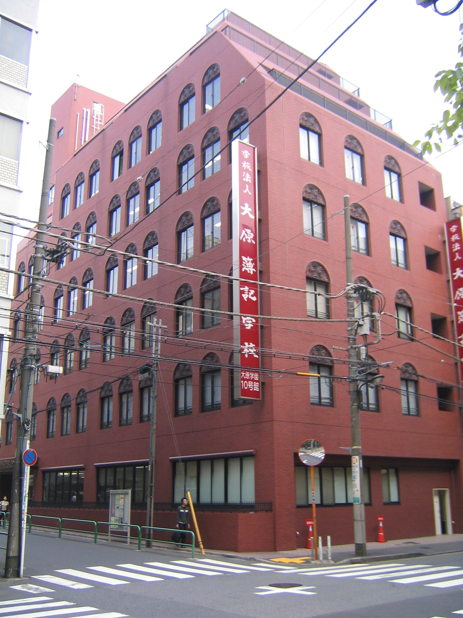 大原学園10号館 (東京都千代田区西神田2-2)